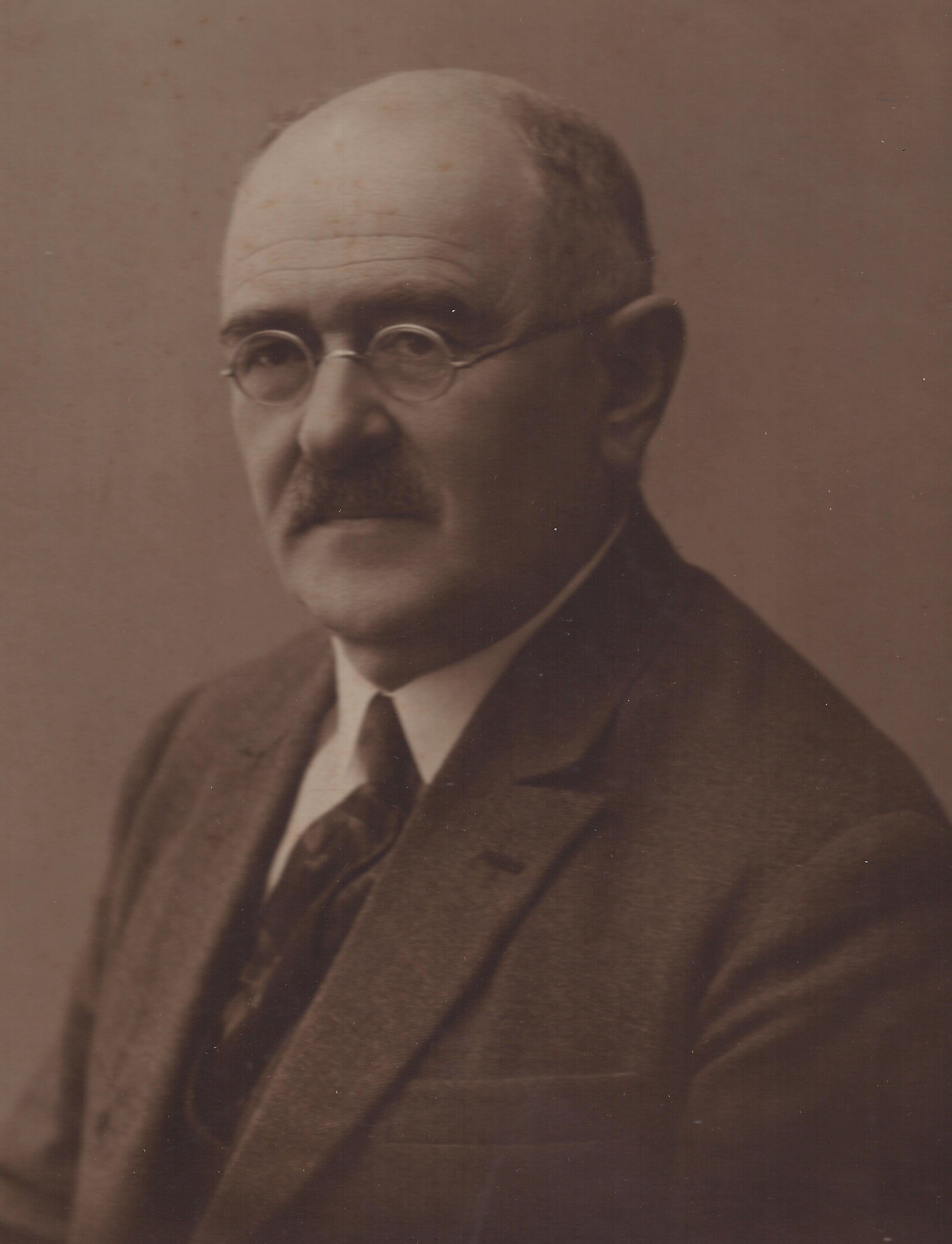 רפאל קוהן, פקיד של הברון רוטשילד בזכרון יעקב